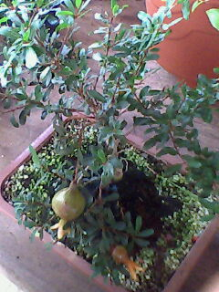 Planta Bonsai de origem brasileira,produzida como Hobby.